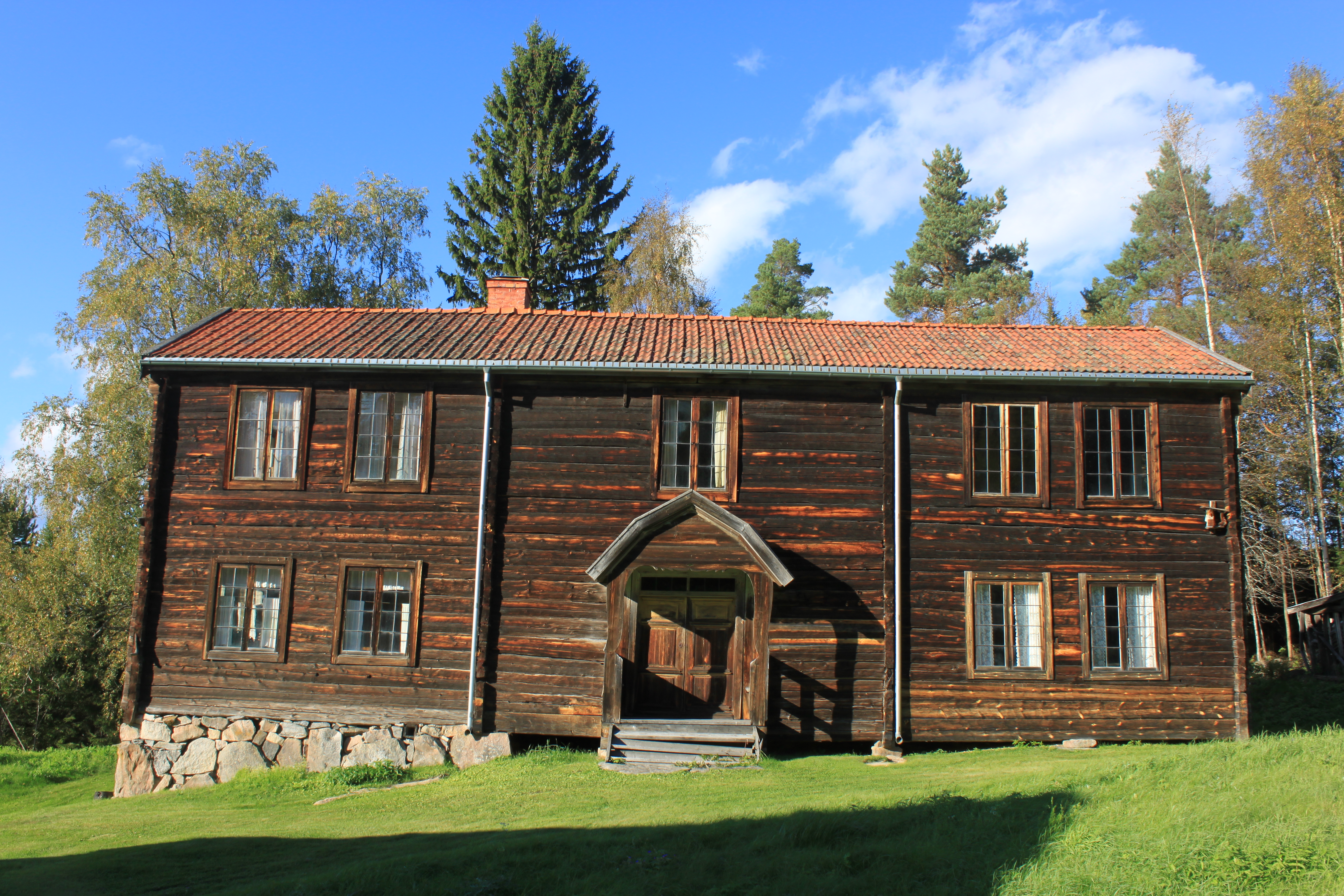 Östigården framifrån.